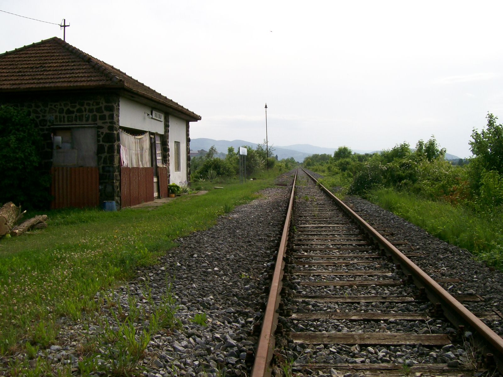 Željeznička stanica u Kraju Donjem u općini Marija Gorica